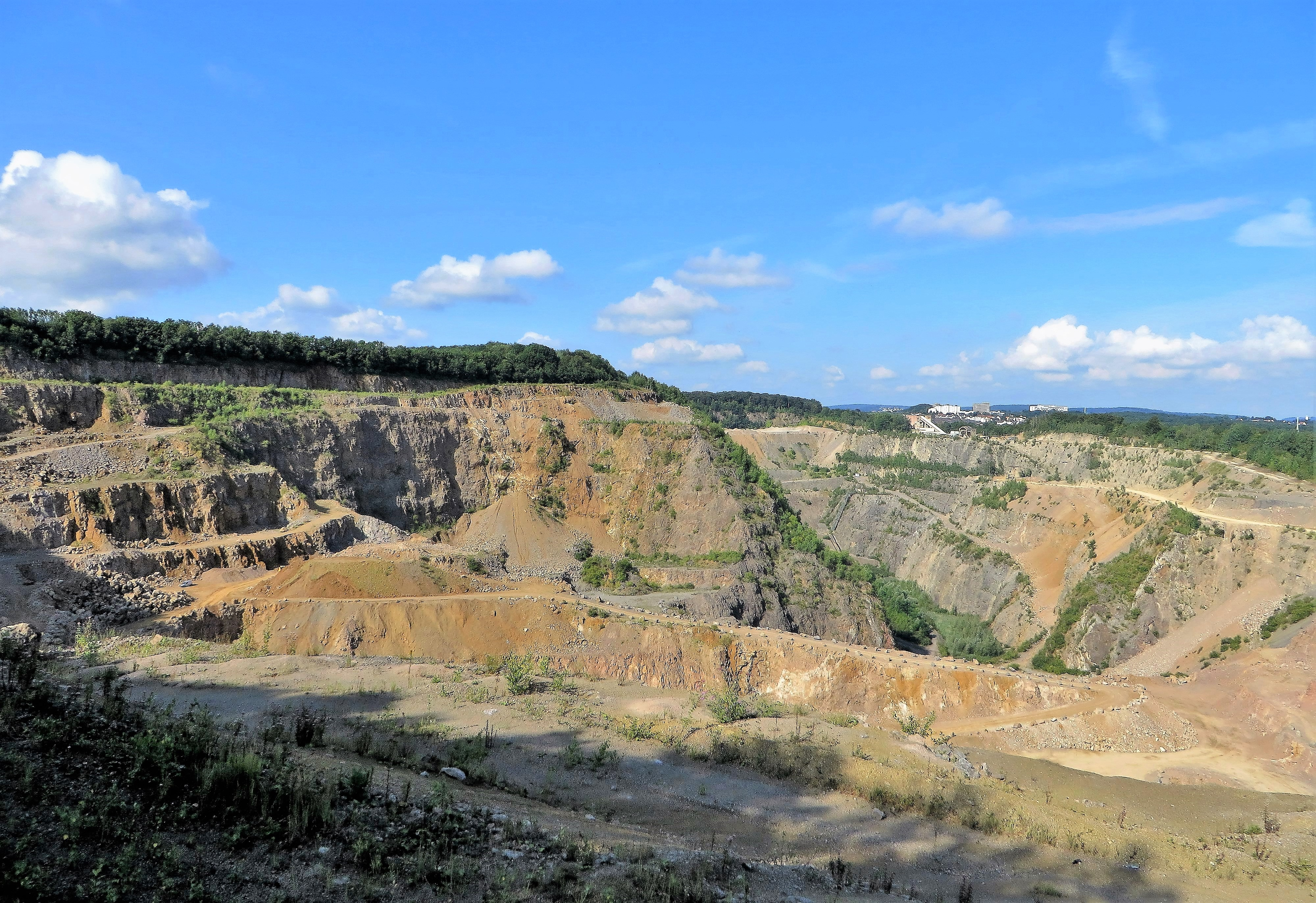 Steinbruch Donnerkuhle der Rheinkalk GmbH (Lhoist-Gruppe) in Hagen. Der östliche Aussichtspunkt (Foto) ist über einen Seitenweg (Abzweig Wald-Wanderweg) der Hohenlimburger Straße (B 7) erreichbar. Die Dolomit-Lagerstätte liegt am Nordrand eines Massenkalkvorkommens der Flüsse Volme und Lenne (Massenkalk der Emster Hochfläche). Hierbei handelt es sich um einen mehr als 600 Meter mächtigen Riffkörper, der vor etwa 370 Millionen Jahren im höheren Mitteldevon gebildet wurde. Der Riffkalkstein lässt meist keine Schichtung erkennen (daher der Name „Massenkalk“) und ist in der Regel sehr rein. Er besteht meist zu über 95 % aus dem Mineral Kalzit. Im Bereich der Donnerkuhle wurde dieser reine Kalkstein aber durch die Zufuhr magnesium-haltiger Wässer teilweise in Dolomitstein umgewandelt.